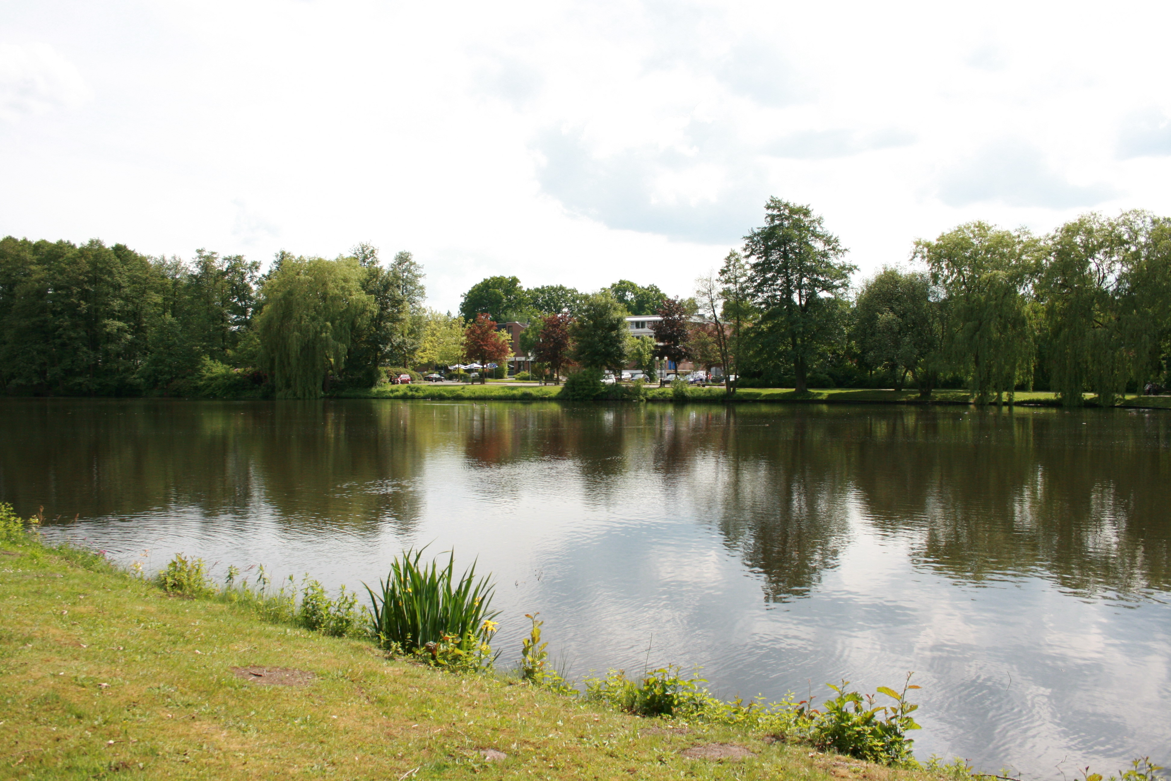 Mühlenteich der Örtze in Munster (Örtze)